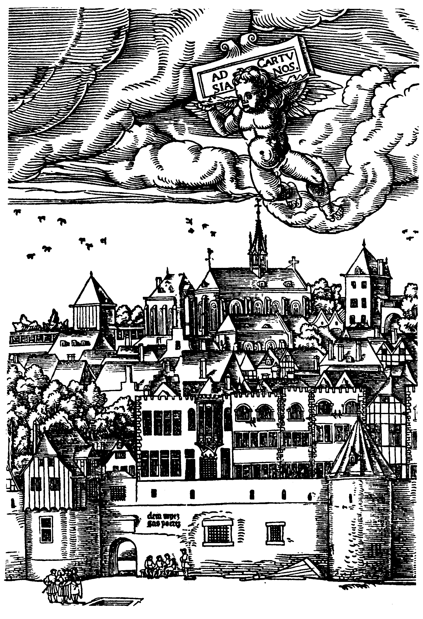 Nach Anton Woensam, 1531: Ansicht des Kartäuserklosters in Köln mit (kleinem) Witschgassentor (wytz poertz)